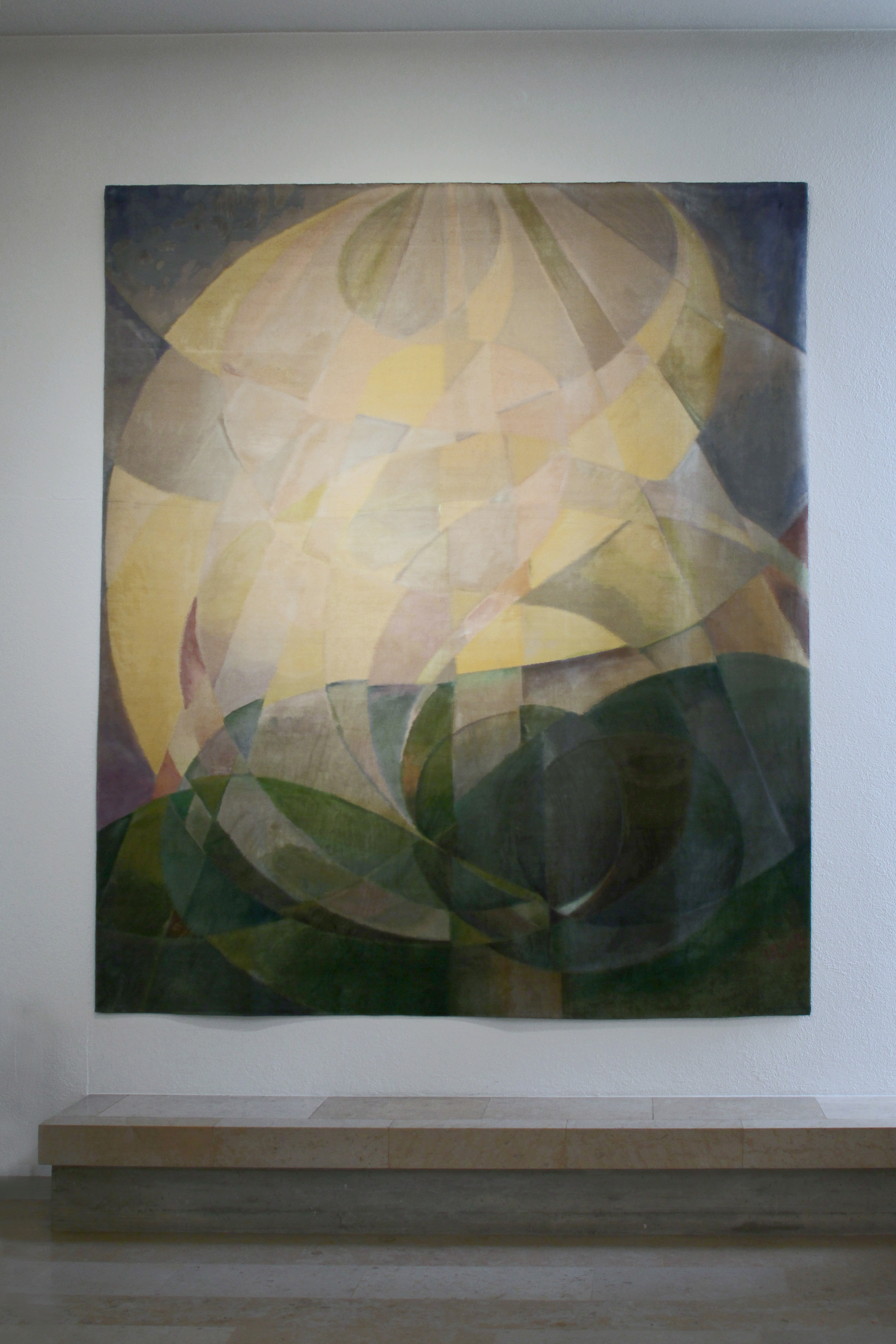 Römisch-katholische Pfarrkirche St. Andreas Uster, Wandteppich von Urs Rickenbach